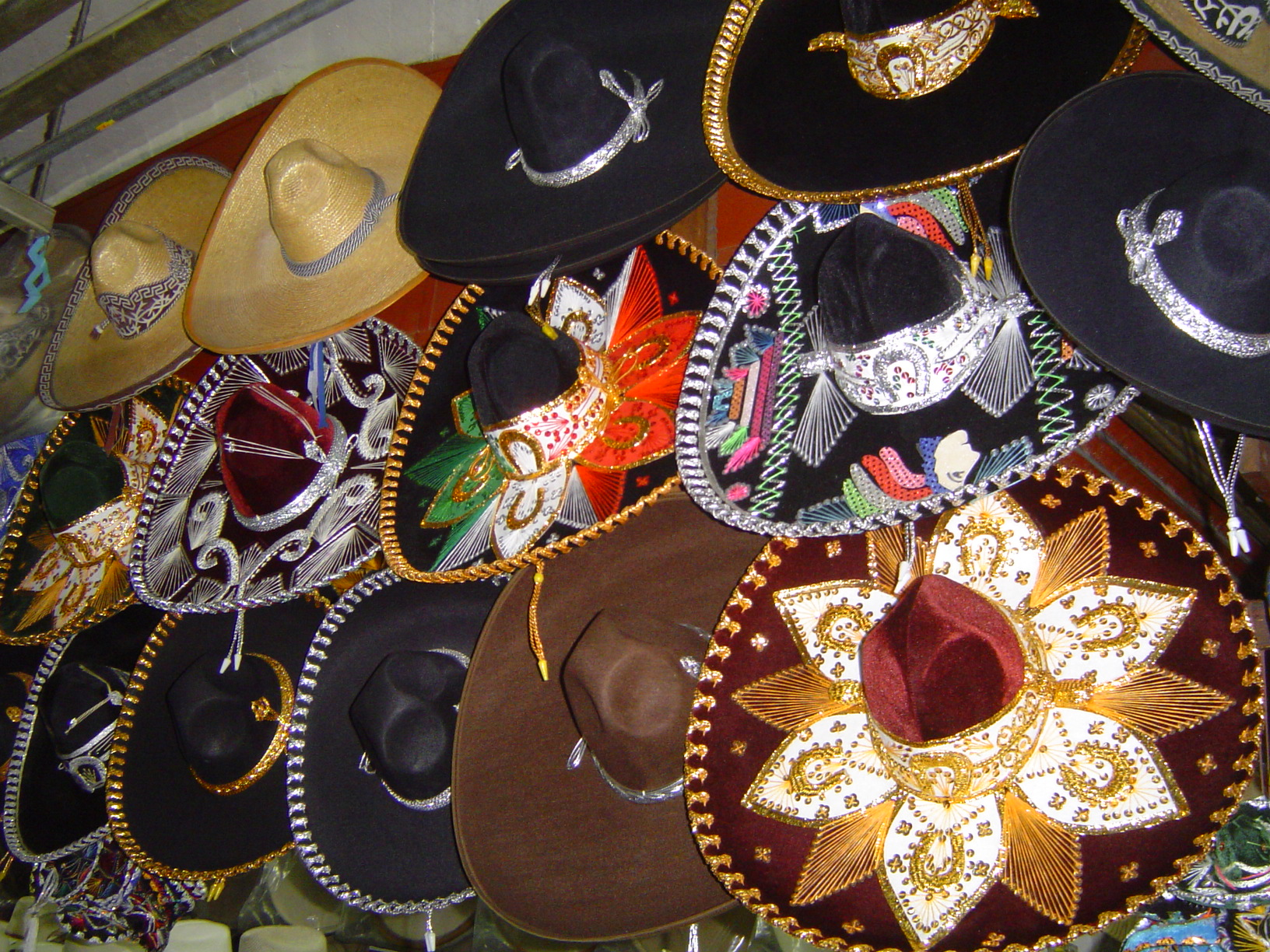 Sombreros, Mexico autor: patrick.denizet